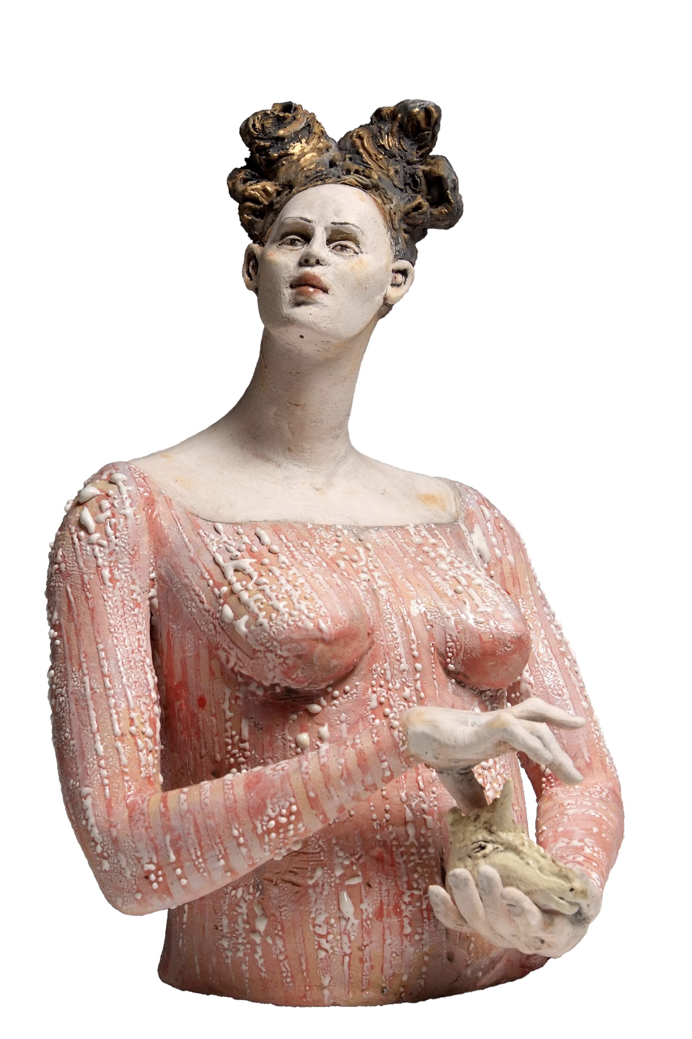 Escultura, Bárbara Balzer, 2011. Primer premio en la X Bienal Internacional de Cerámcia de Manises (o Premio President de la Generalitat en la X Bienal Internacional de Cerámica de Manises)